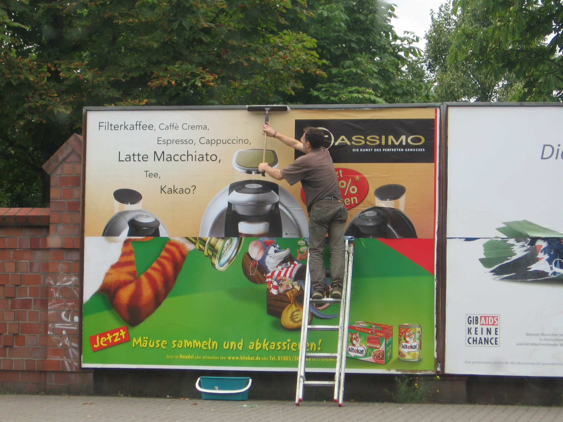 Legaal aanplakken